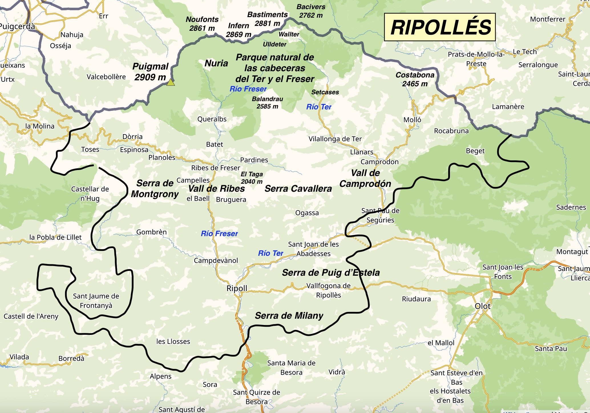 Mapa del Ripollés con zonas naturales, picos, íos y pistas de esquí a partir de